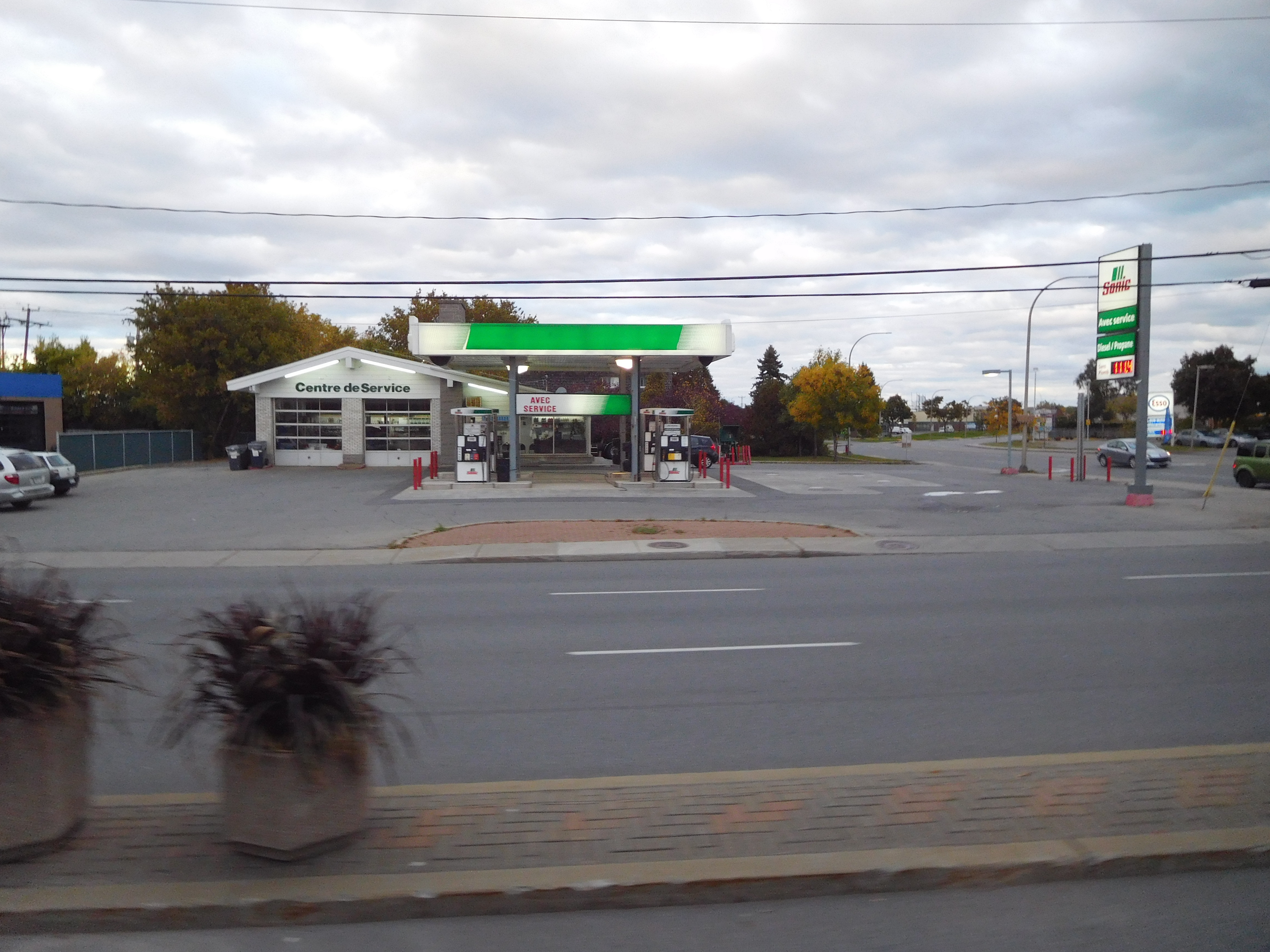 Sonic, 3055, boulevard Saint-Charles / boulevard Hymus, Kirkland, Québec